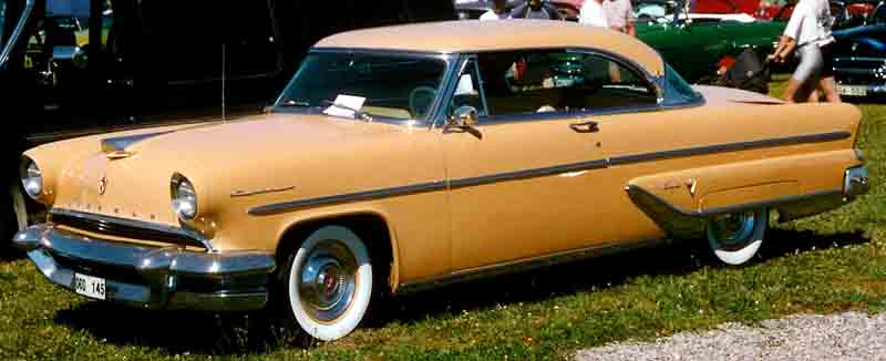 Lincoln Capri 2 Door Hardtop, 1955